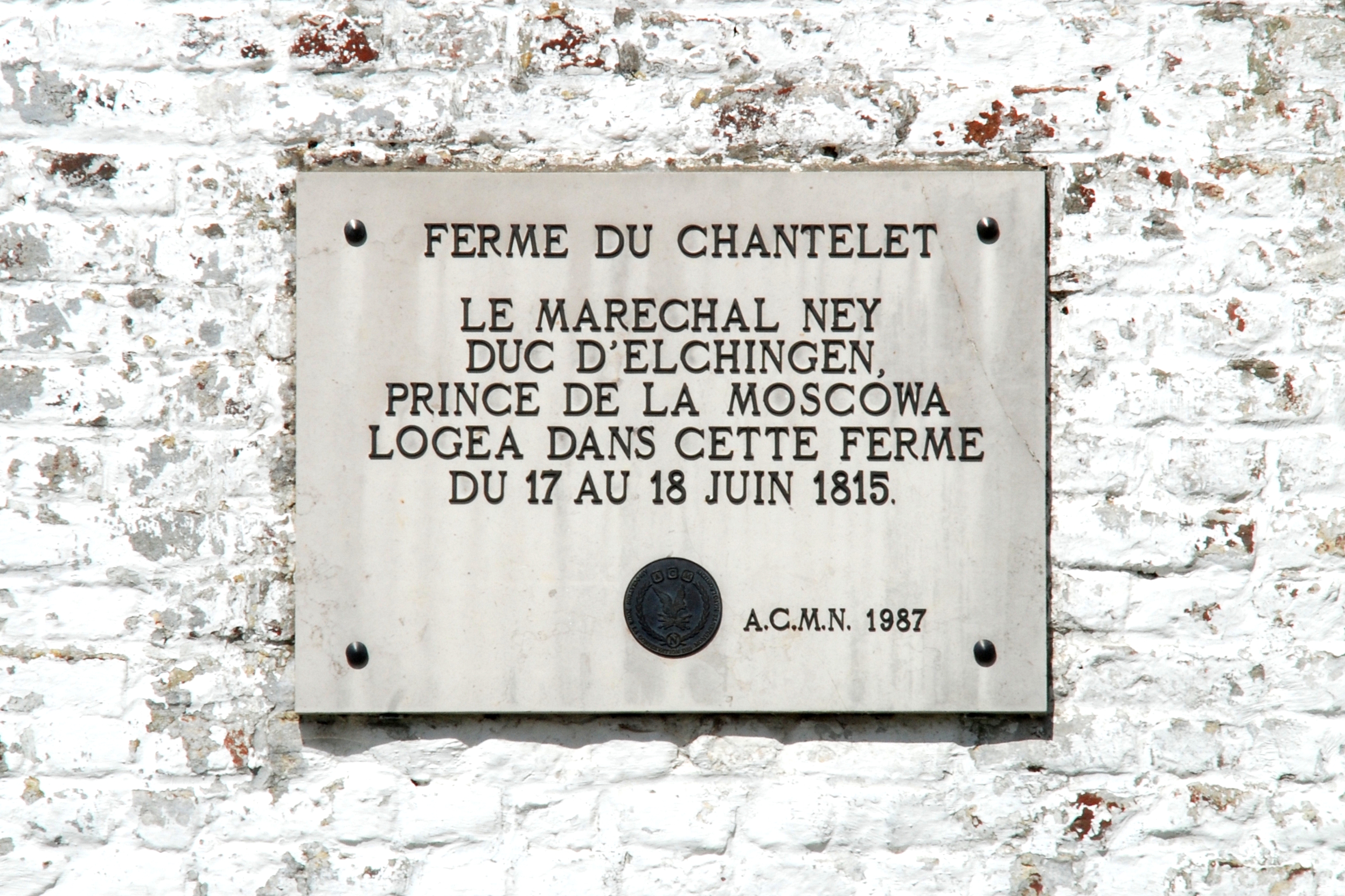 Belgique - Brabant wallon - Genappe - Ferme du Chantelet